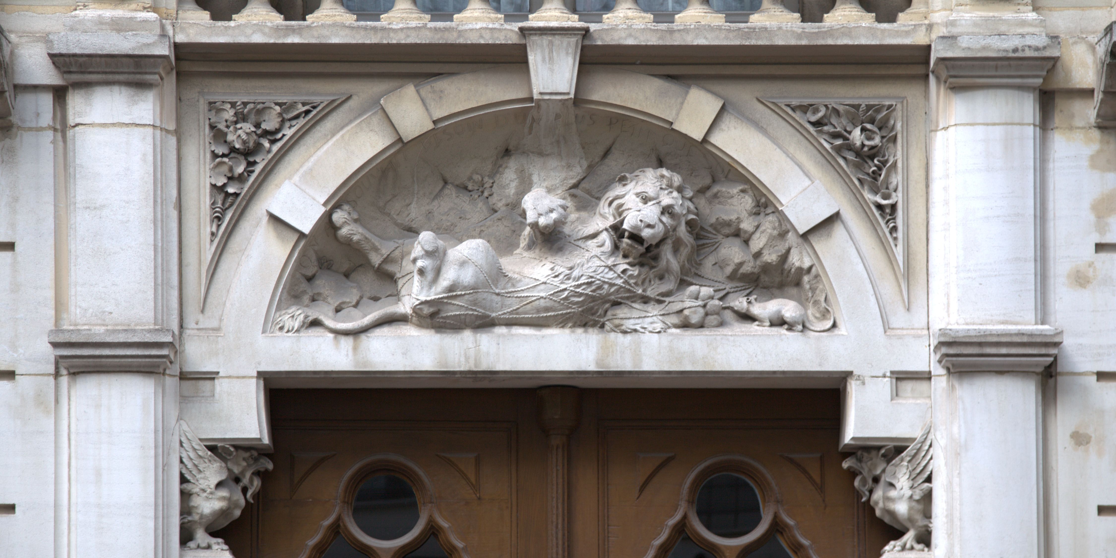 Le tymphan du numéro 30, avenue Verdier, à Montrouge